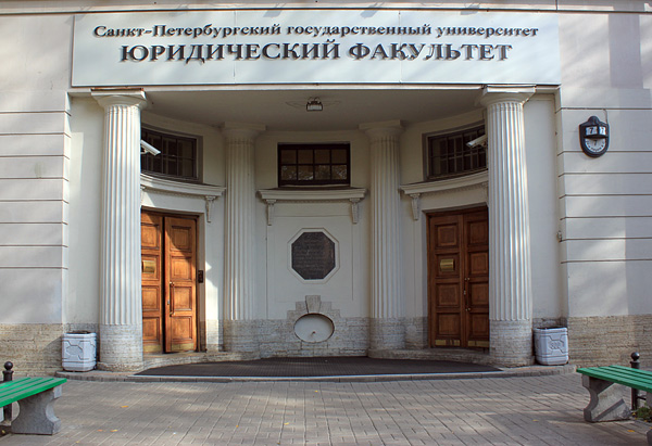 hougaku